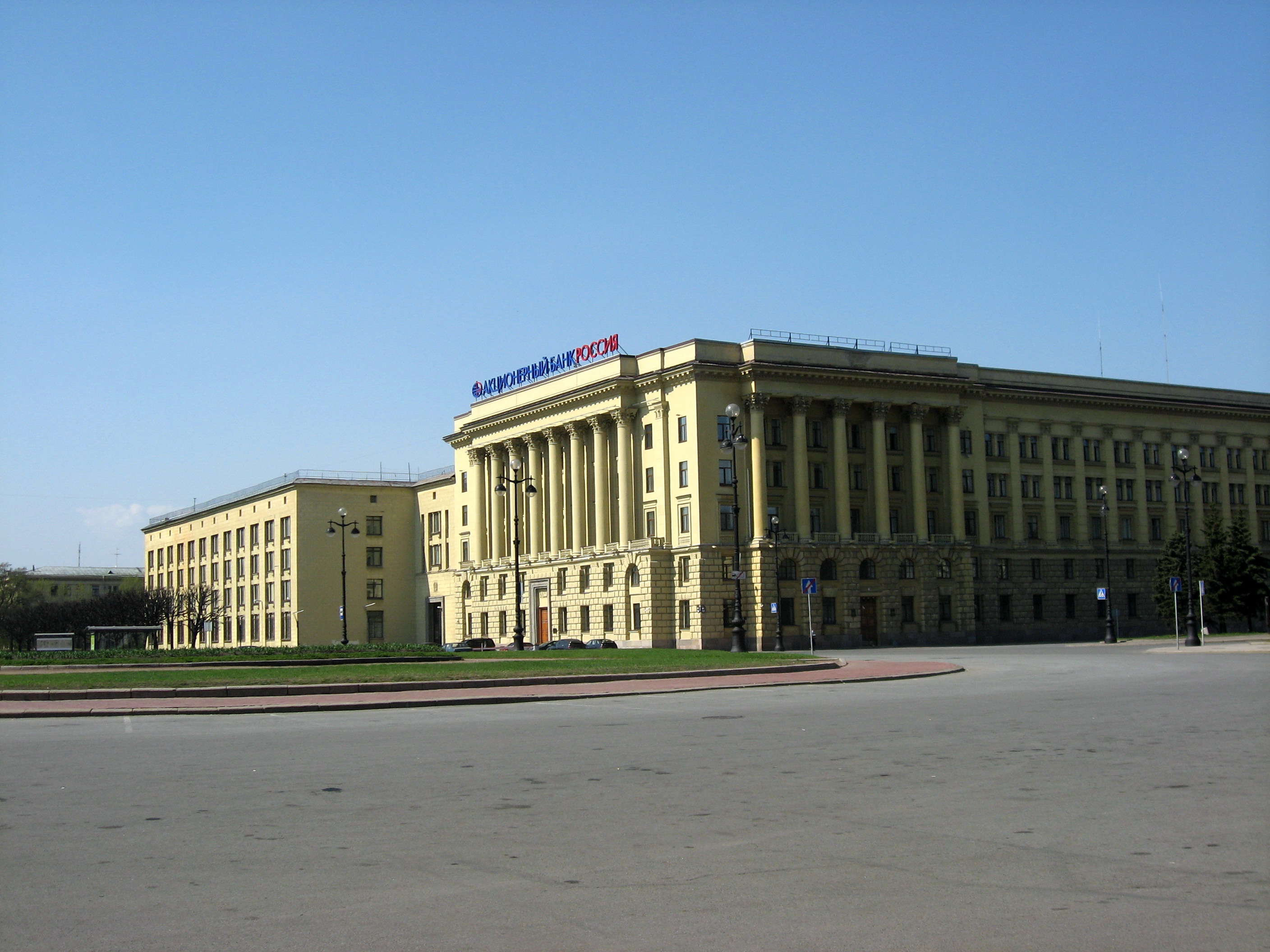 Sankt-Petěrburg (Petrohrad)